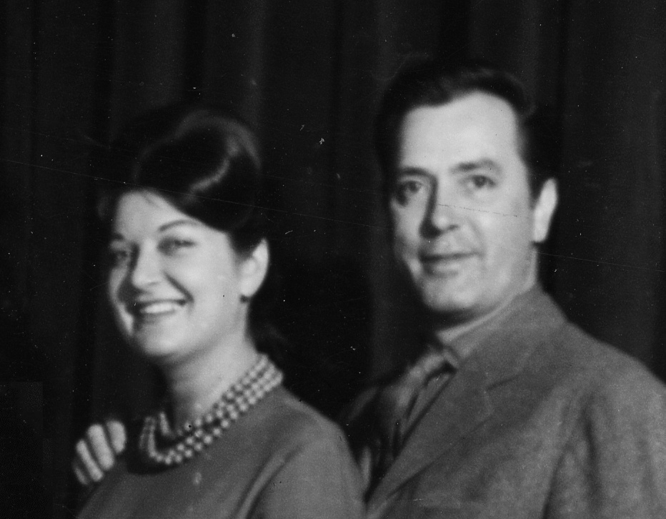 A Magyar Rádió A Szabó család című sorozatának főszereplői. Részlet: Balogh Erzsi és Benkő Gyula.